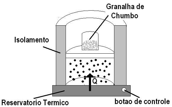 Reservatorio Termico 1,Gustinho Rossi.